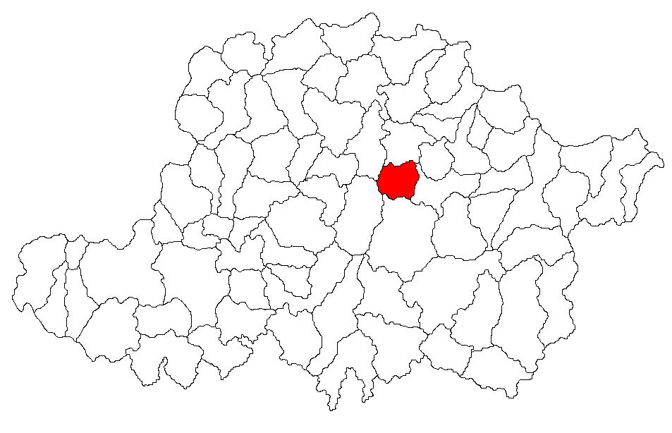 Categorie:Hărţi ale judeţului Arad